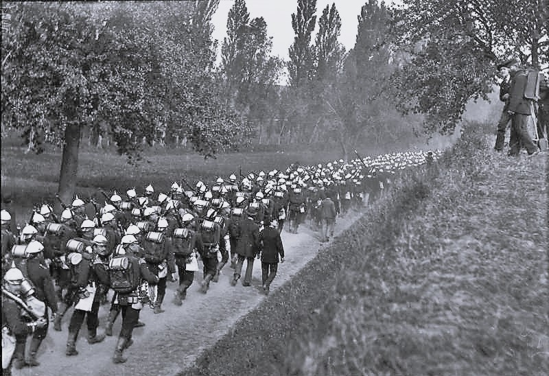 Odenwald, Kaisermanöver Kaisermanöver im Odenwald 1888 Ganz rechts oben: der Gepäckträger des Manöverphotographen